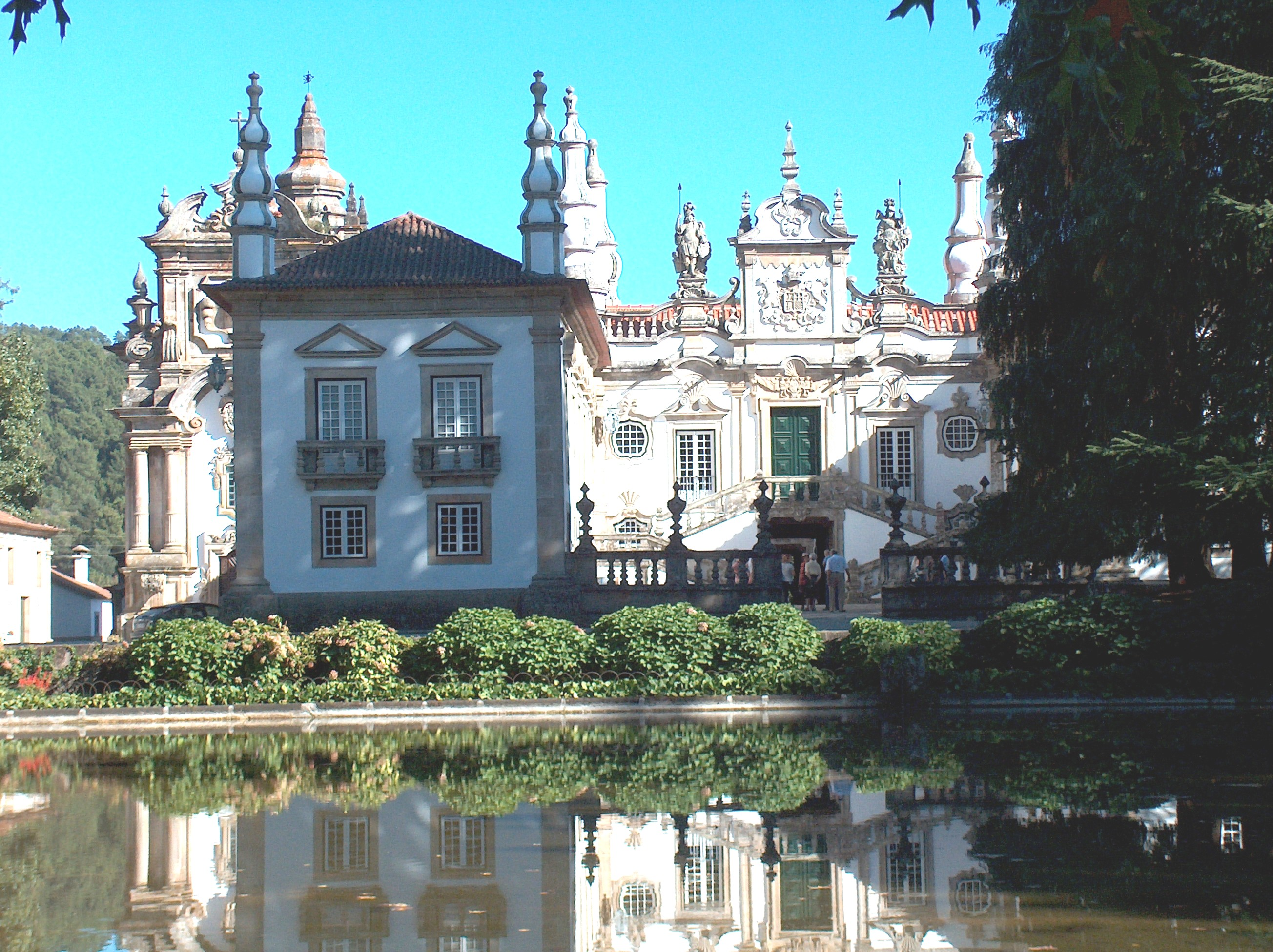 Descrição Palácio de Mateus freguesia de Mateus, concelho de Vila Real, Distrito de Vila Real, Portugal. Fonte Carregada pelo autor Autor João Carvalho